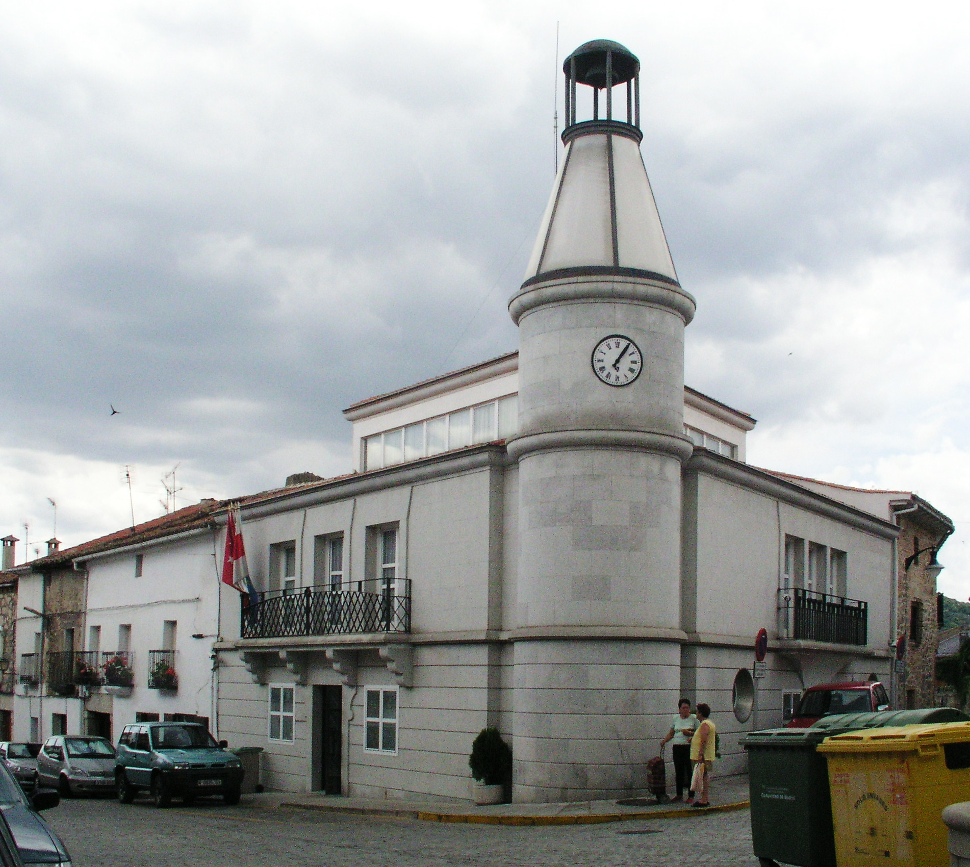 Cadalso de los Vidrios, Ayuntamiento, Comunidad de Madrid, Spain